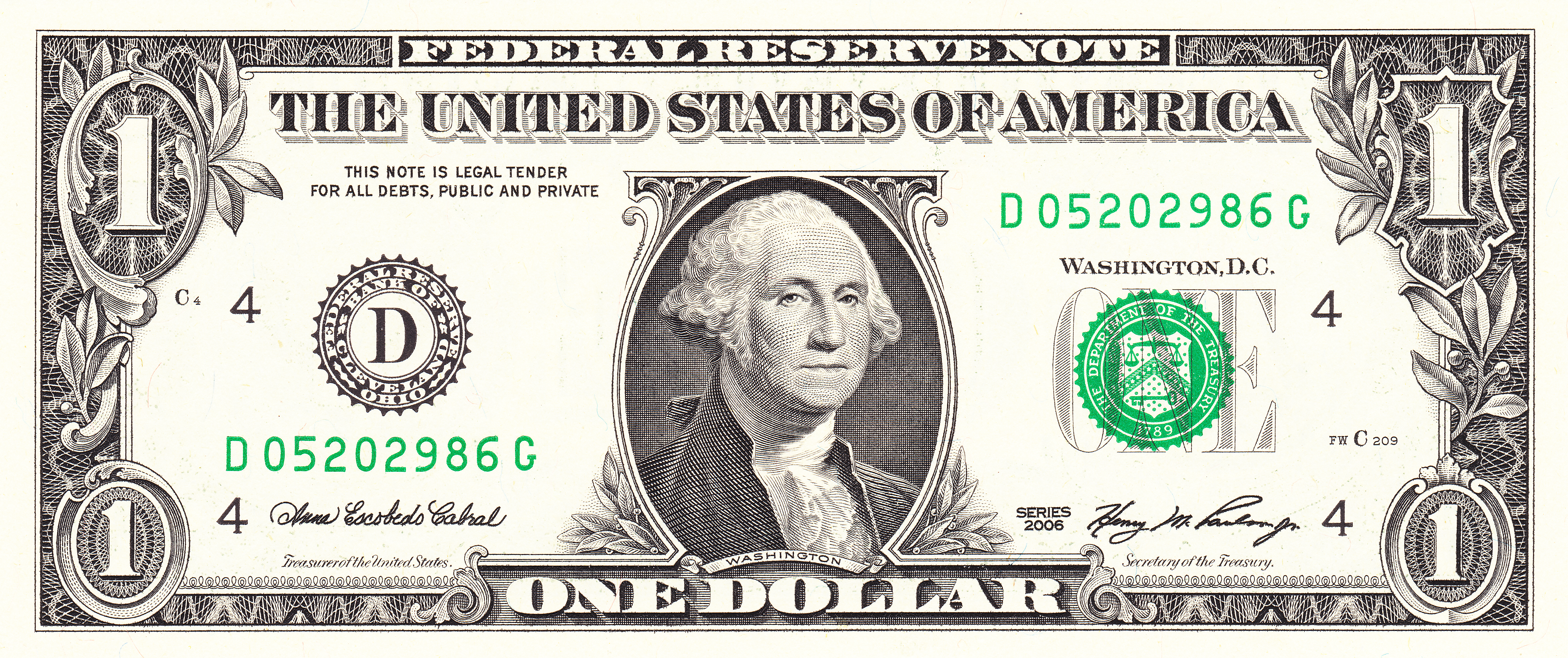 Ein US-Dollar